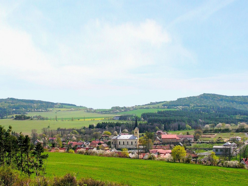 Pohled z Číhadla